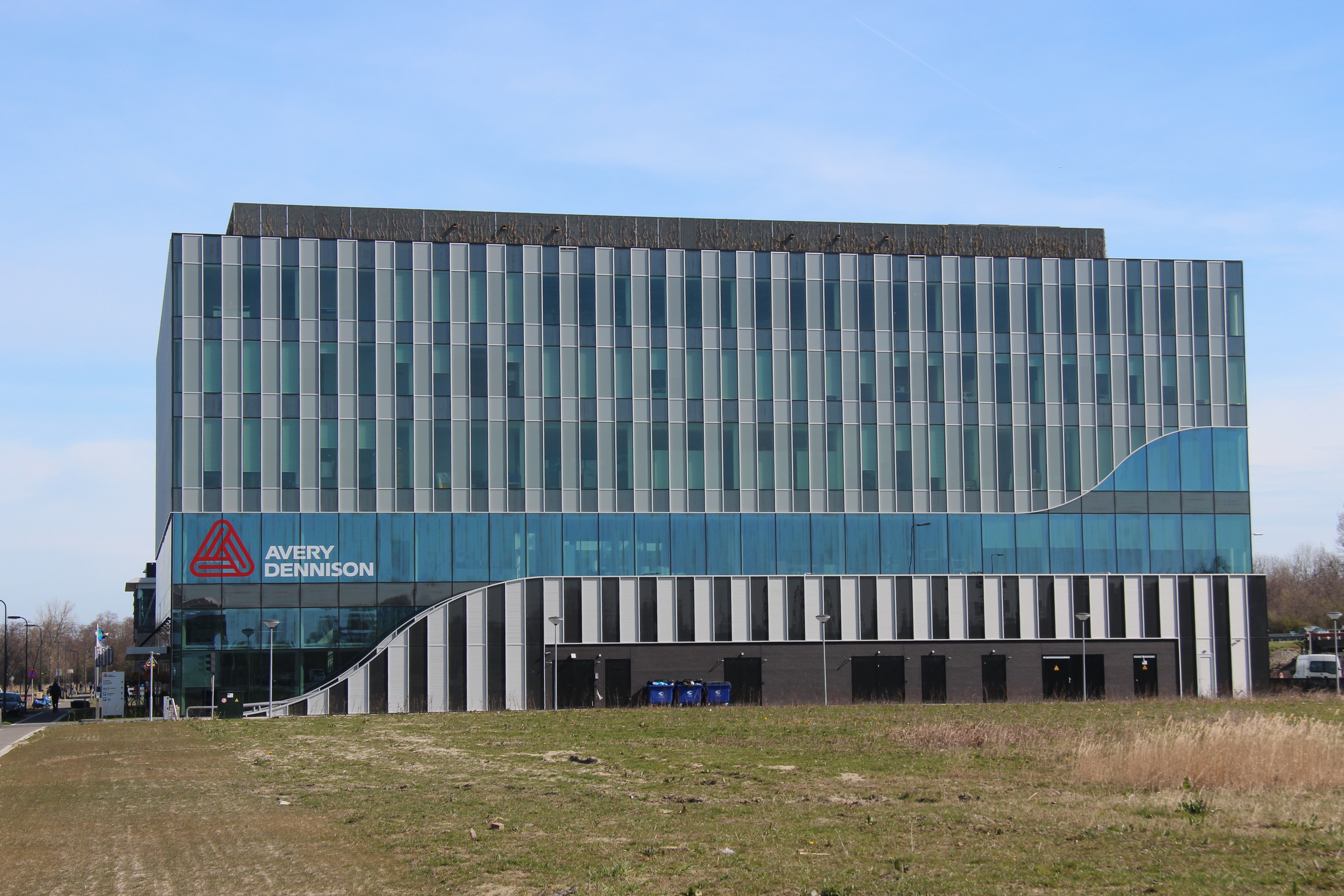 Avery Dennison Europe Corporate Office, Willem Einthovenstraat 11, 2342 BH Oegstgeest